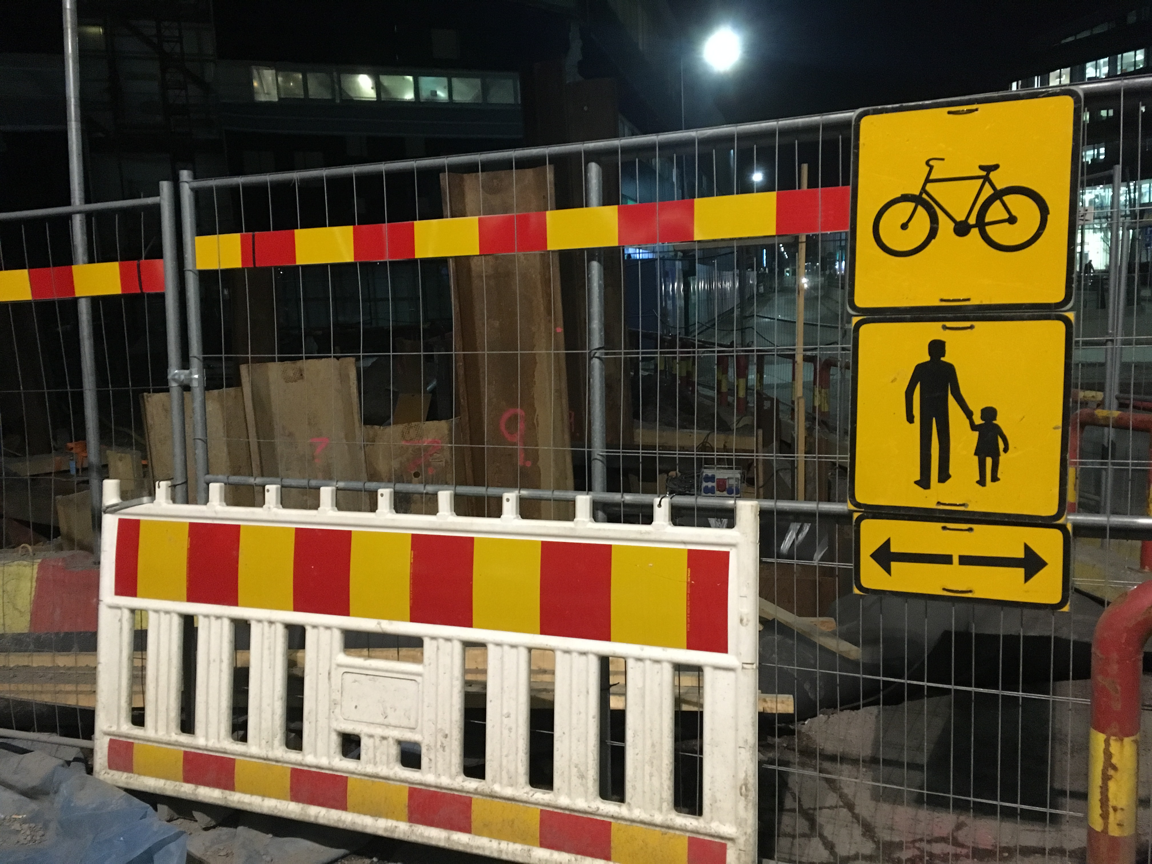 Helsinki in 2018